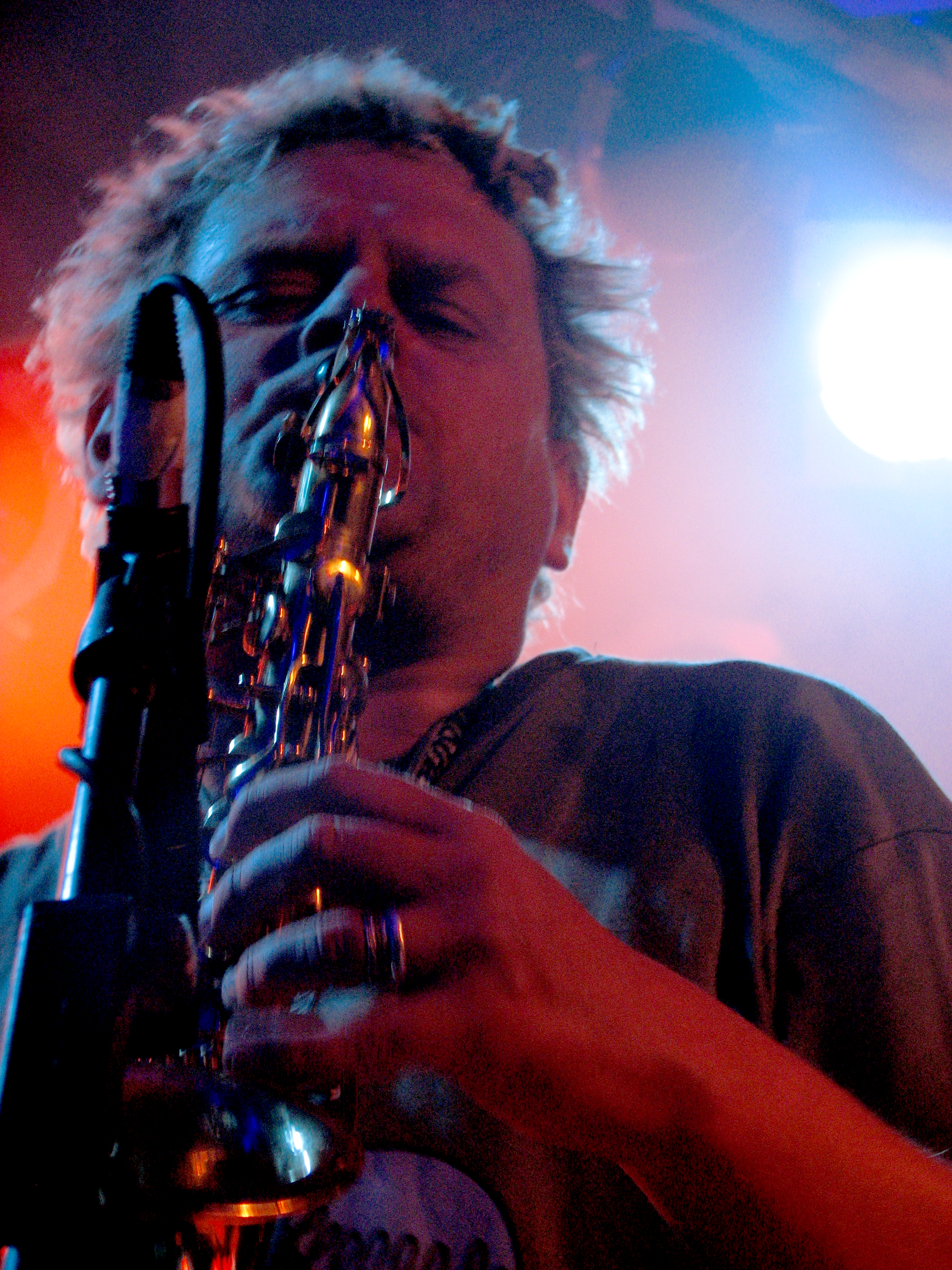 Plagiat 199 podczas koncertu w Mega Clubie 20.04.2008